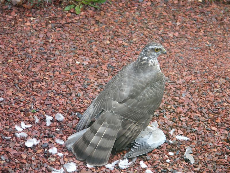 Een sperwer Accipiter nisus (wijfje) eet een duifje op de garageoprit te De Klinge, België